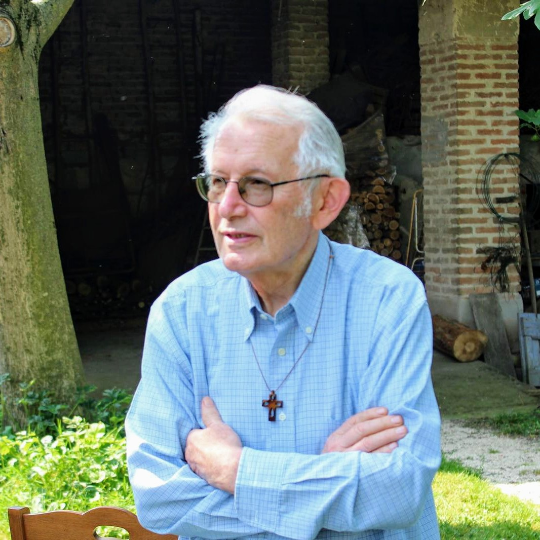 Fotografia di Don Arnaldo Peternazzi scattata nel cortile della sua casa paterna a Scandolara Ravara.